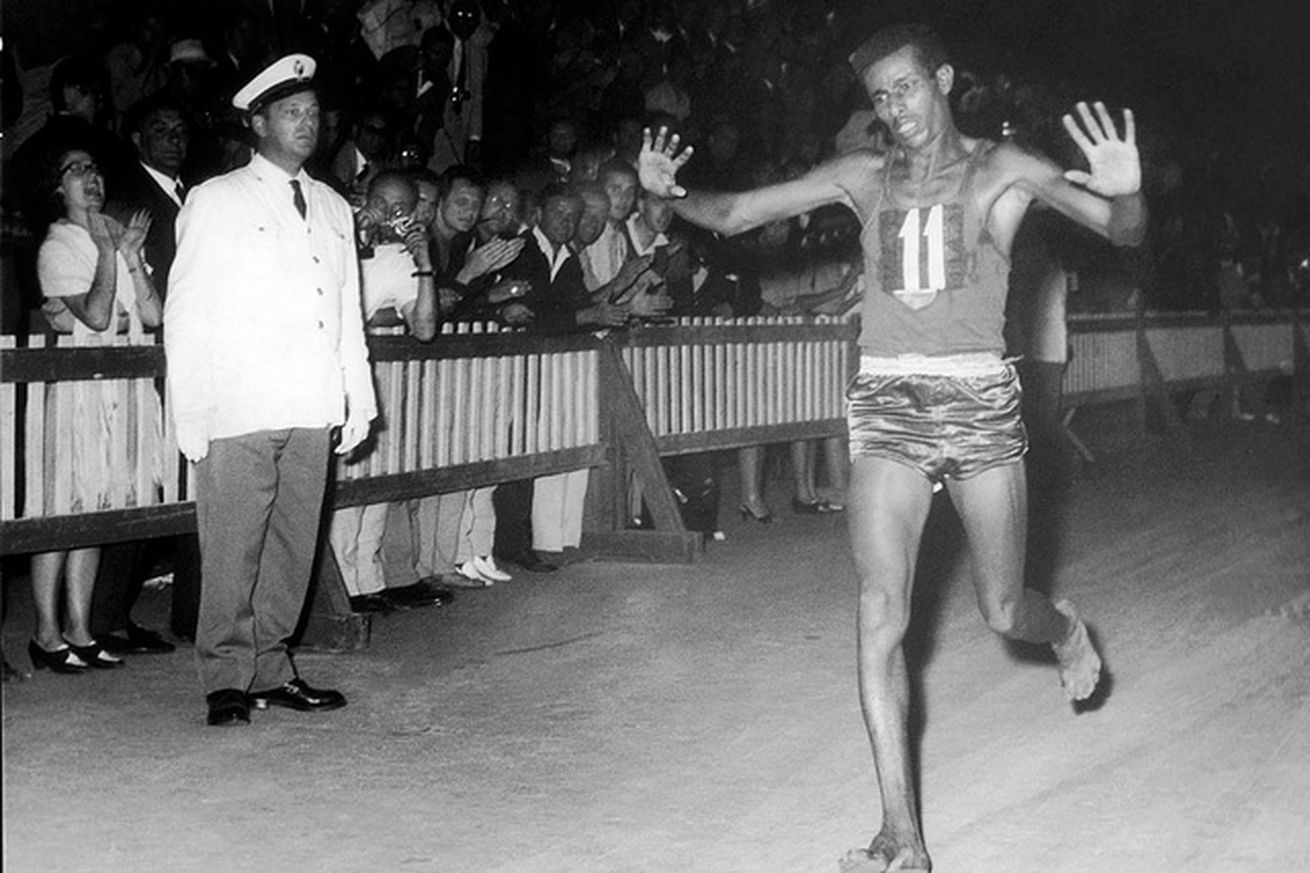 Abebe Bikila vince la maratona ai Giochi olimpici di Roma del 1960Bikila, Abebe